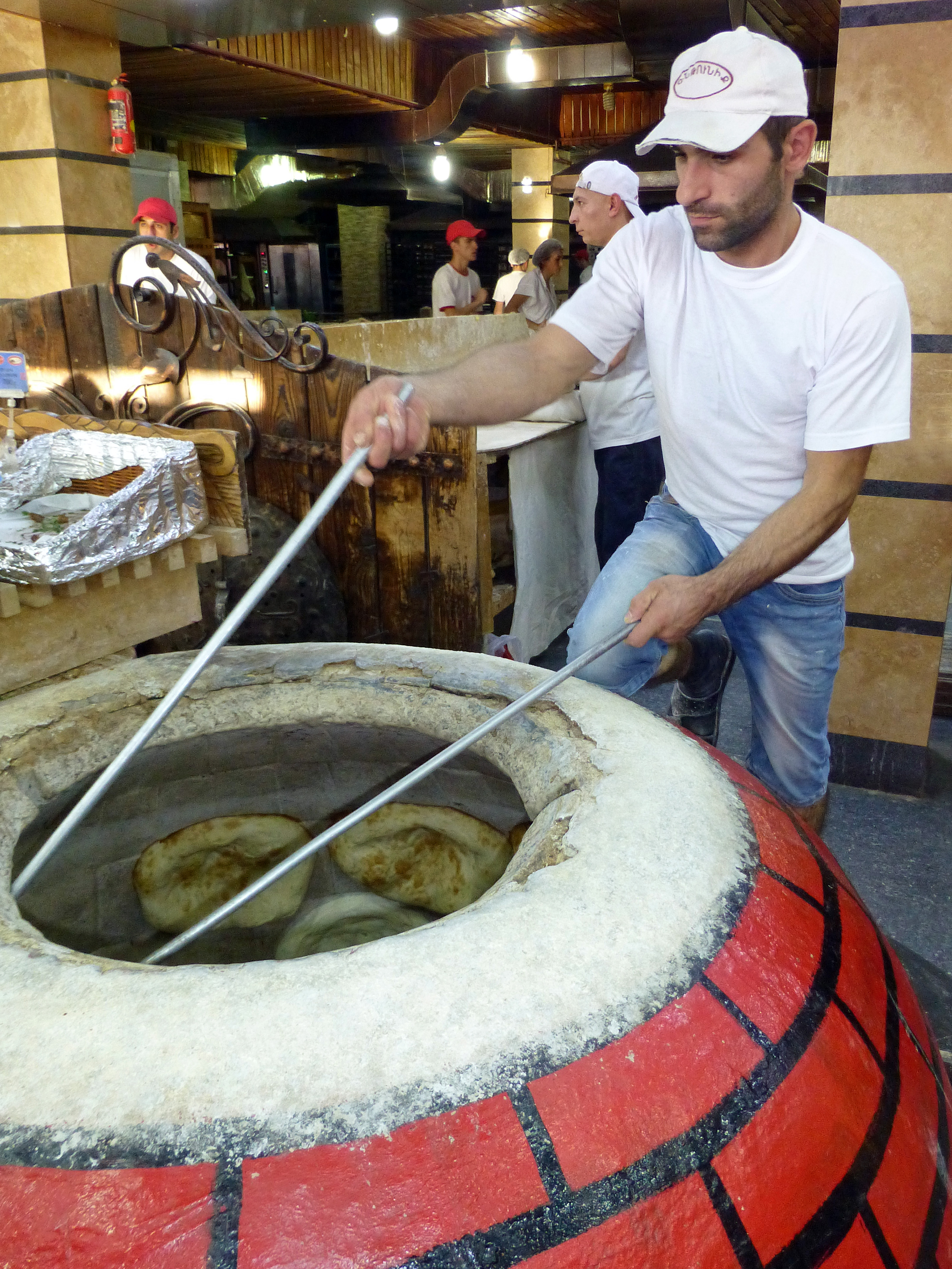 Fabrication de pain géorgien à Aparan (Arménie). Le pain est collé contre les parois d'un four rond (tone).